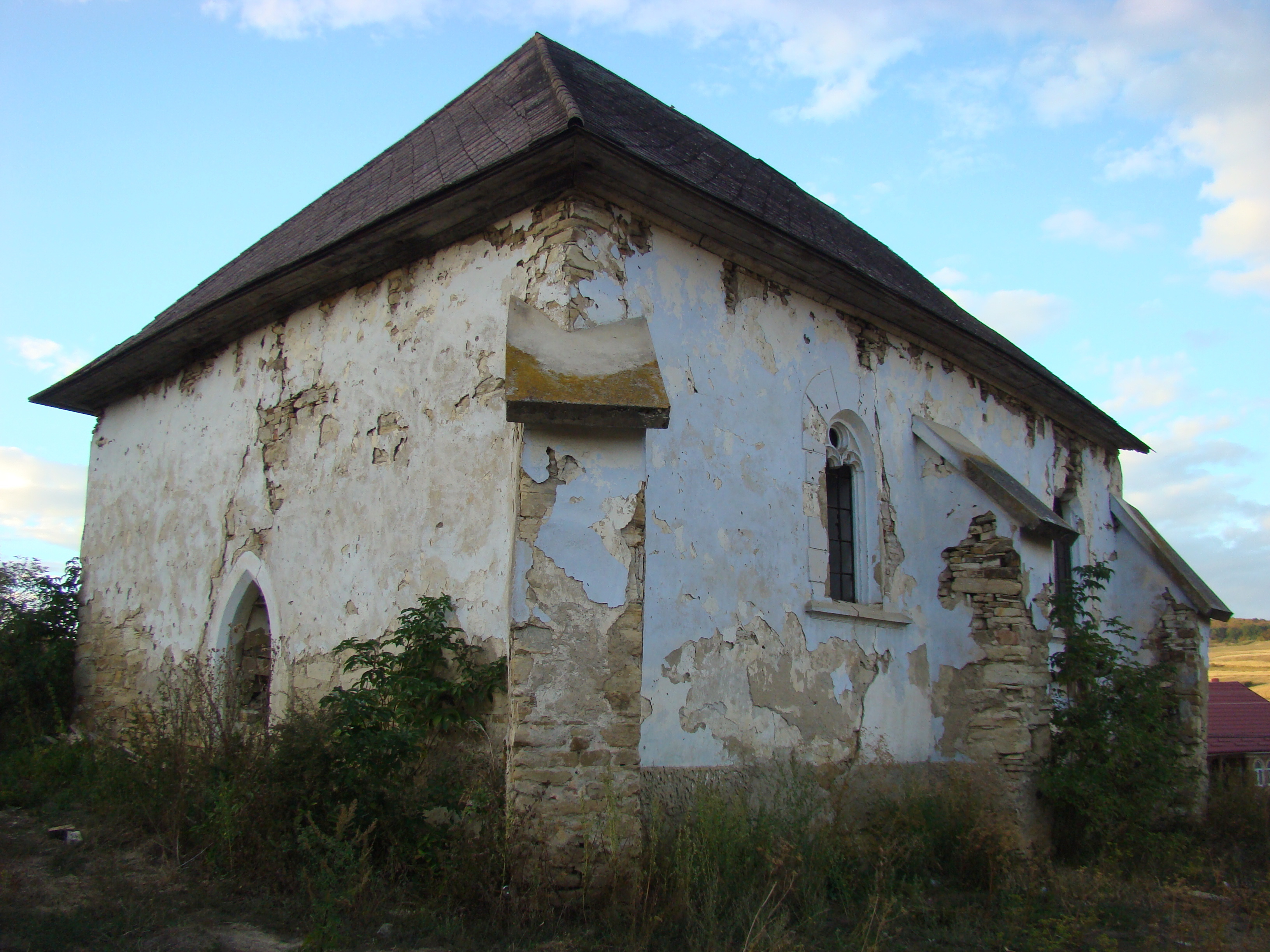 Biserica evanghelică, sat CORVINEŞTI; comuna MATEI 01